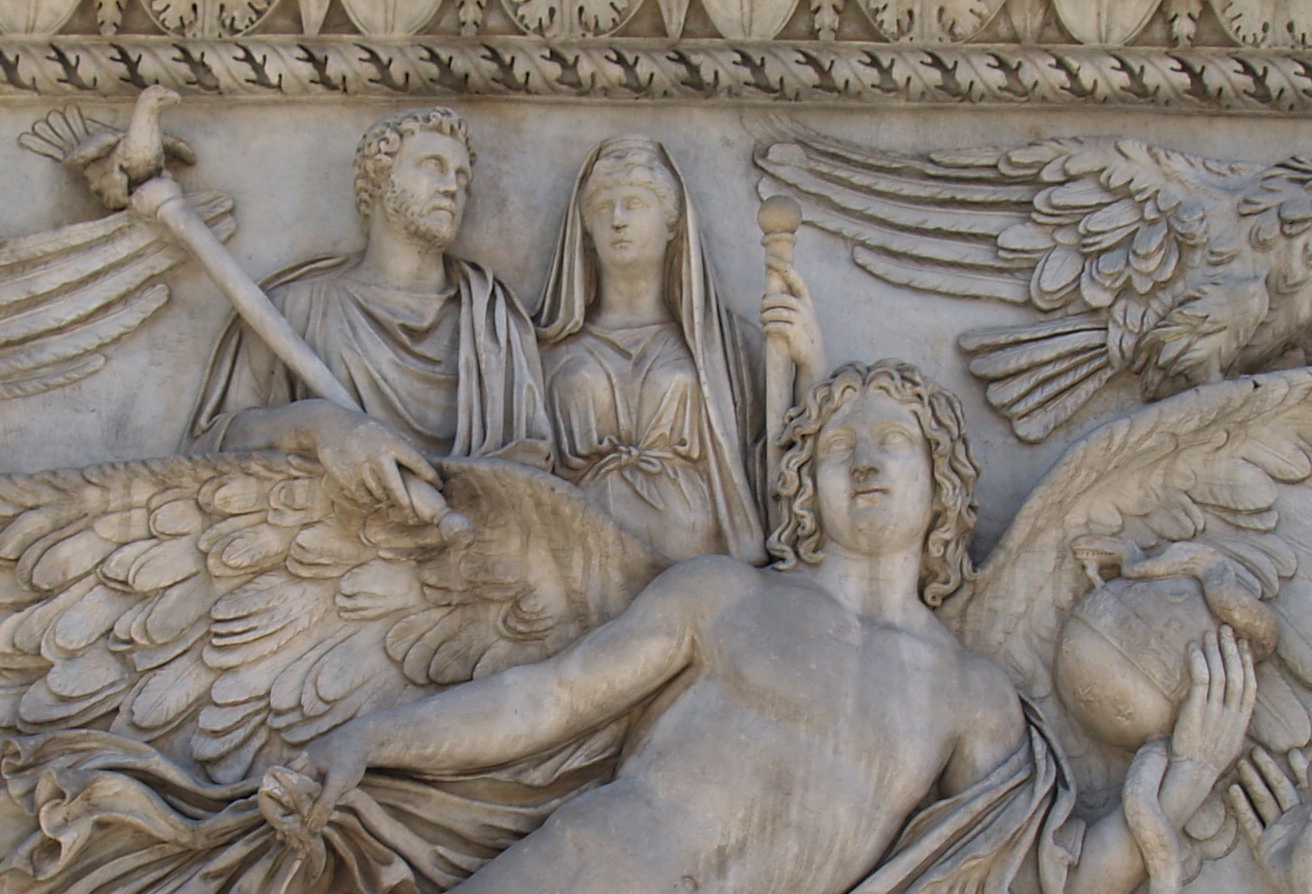 Interlingua: Base del columna de Antonino Pio: representation del apotheose del divin Pio e del divin Faustina.